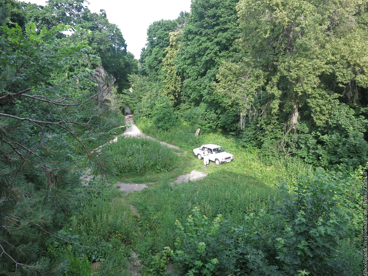 Полчаниновский приусадебный парк: Татищевский район, Саратовская область This image is related to the protected area of Russia number 6410145